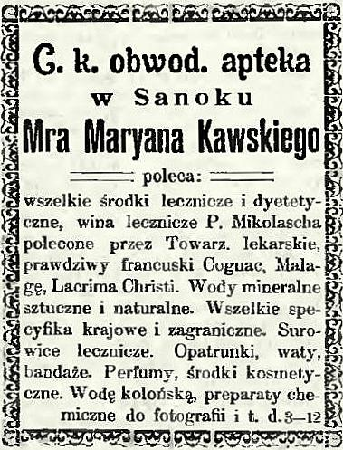 Ogłoszenie reklamowe c. k. obwodowej apteki Mariana Kawskiego w Sanoku (1906).